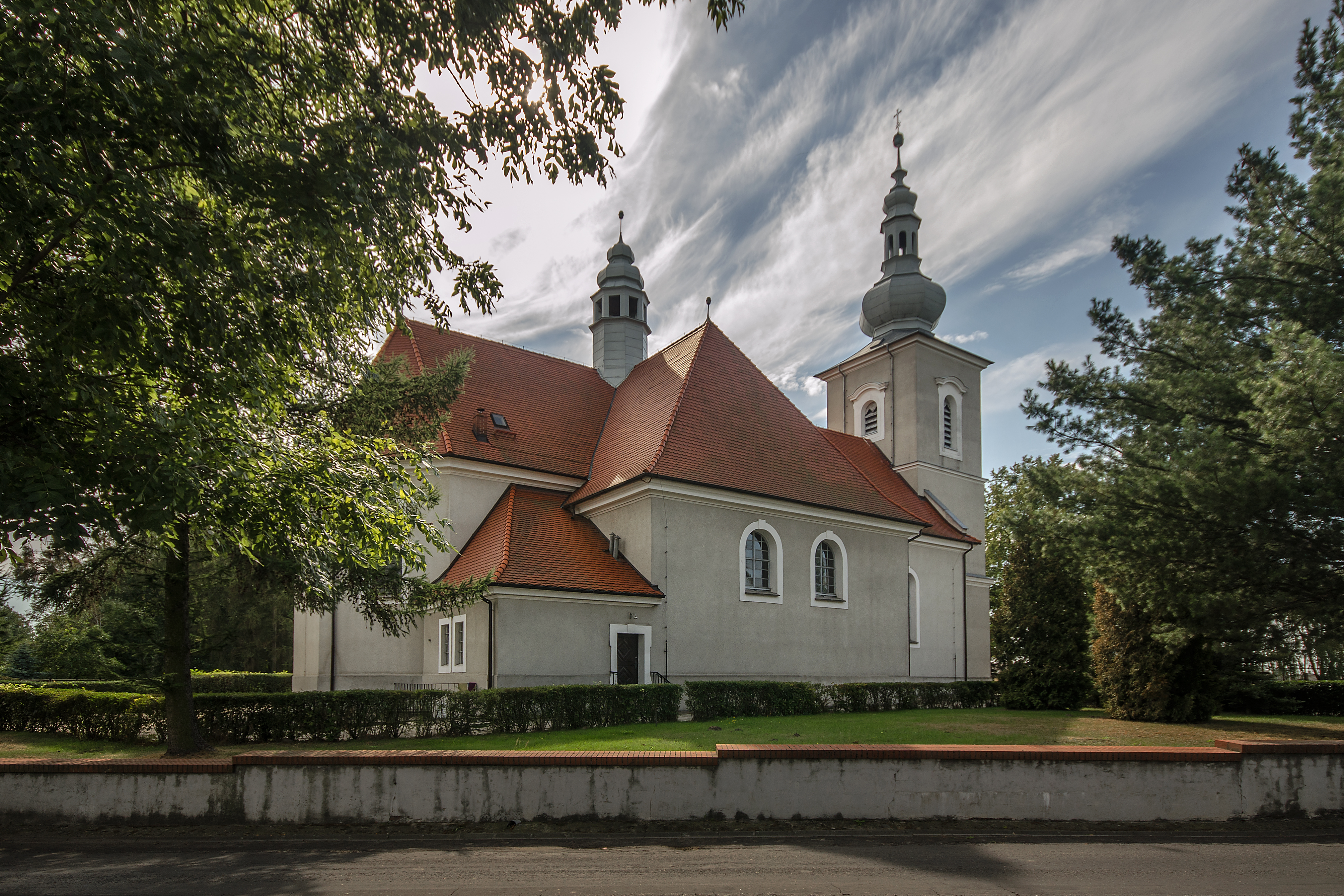 Kujakowice Górne, kościół par. p.w. św. Stanisława Biskupa, 1801-1803